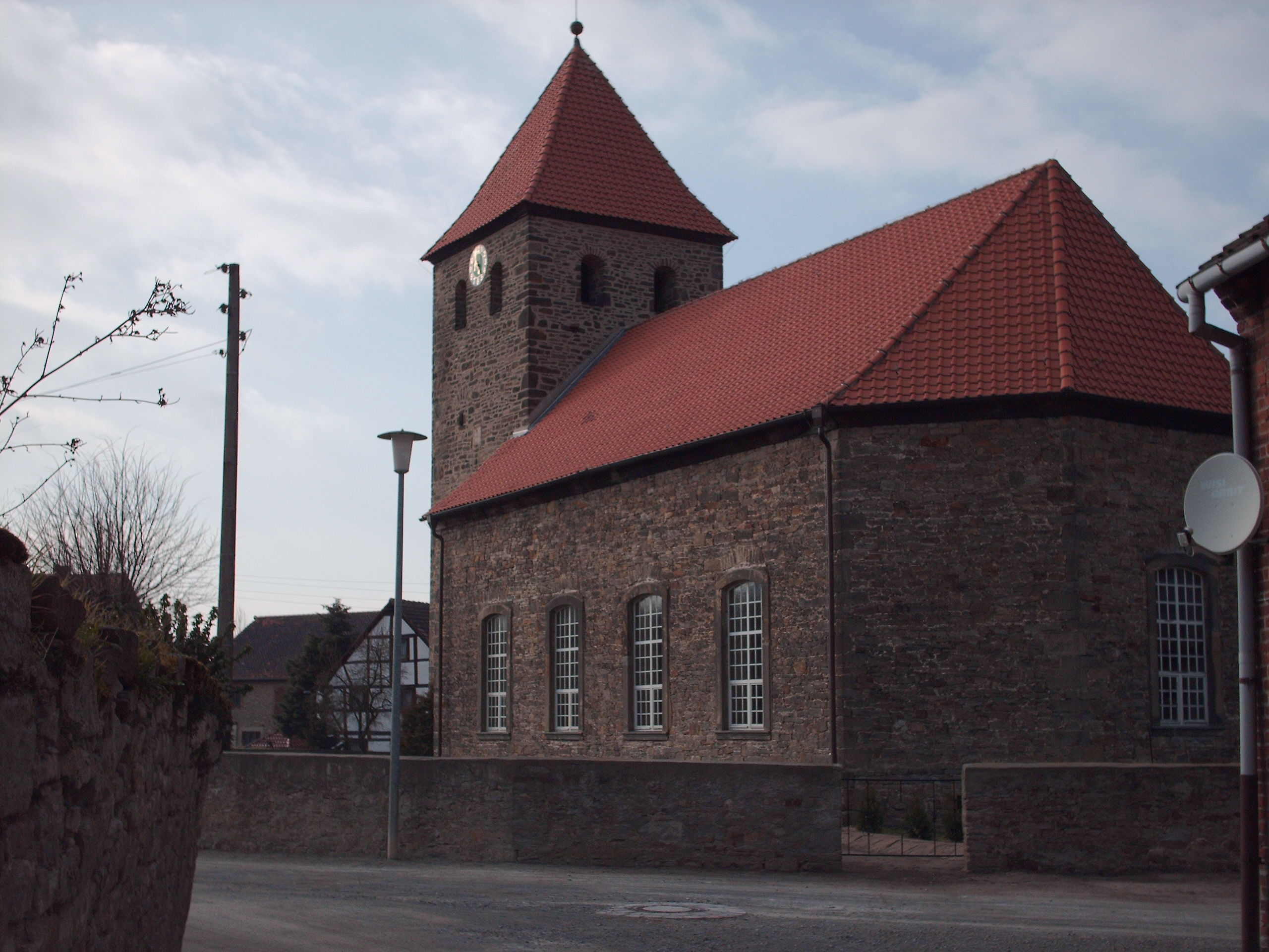 Eschenrode